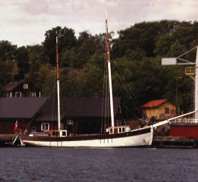 Picture taken 1983 of Pratibha and Axel Jensen's ketch "Shanti Devi" at "Mälarvarvet" (The Mälaren Yard) in Stockholm by Robert E. Haraldsen.